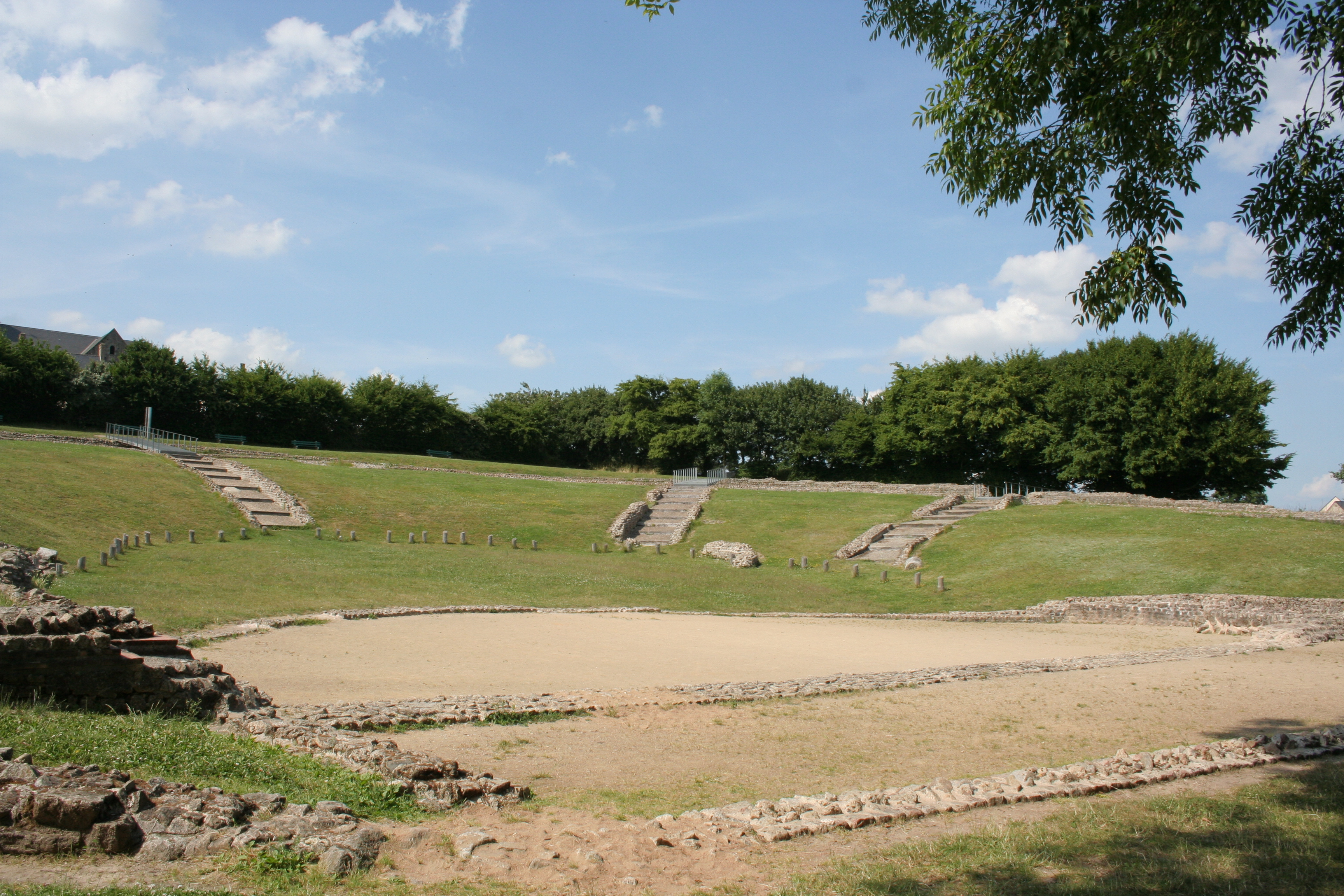 Site archéologique de Jublains, France. Site du théatre.